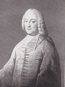 Louis-Guillaume du Tillet (1730-1794), dernier évêque d'Orange